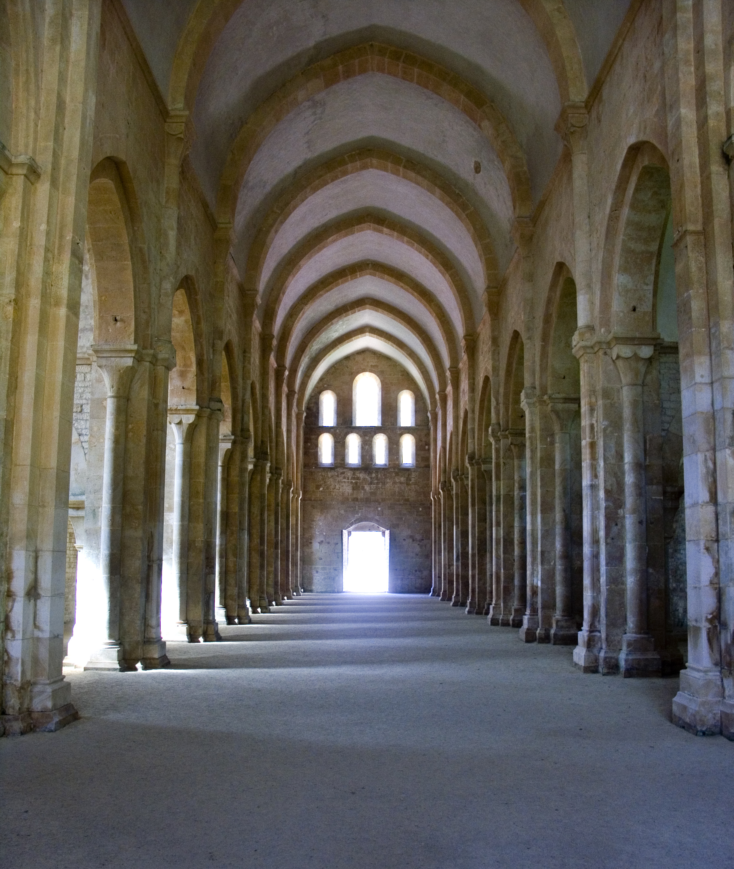 Abbaye de Fontenay - Intérieur de l'église